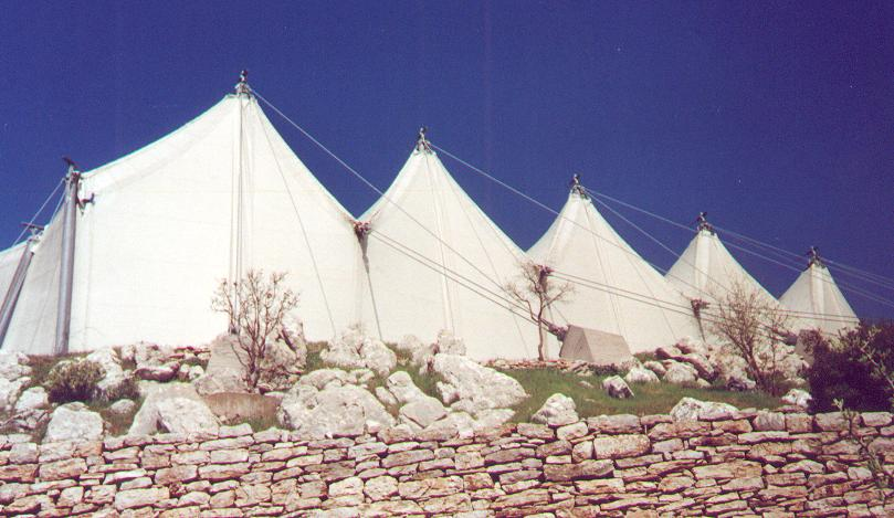 de tentconstructie die de tempel moet beschermen tegen verdere aftakeling. Eigen foto 1996